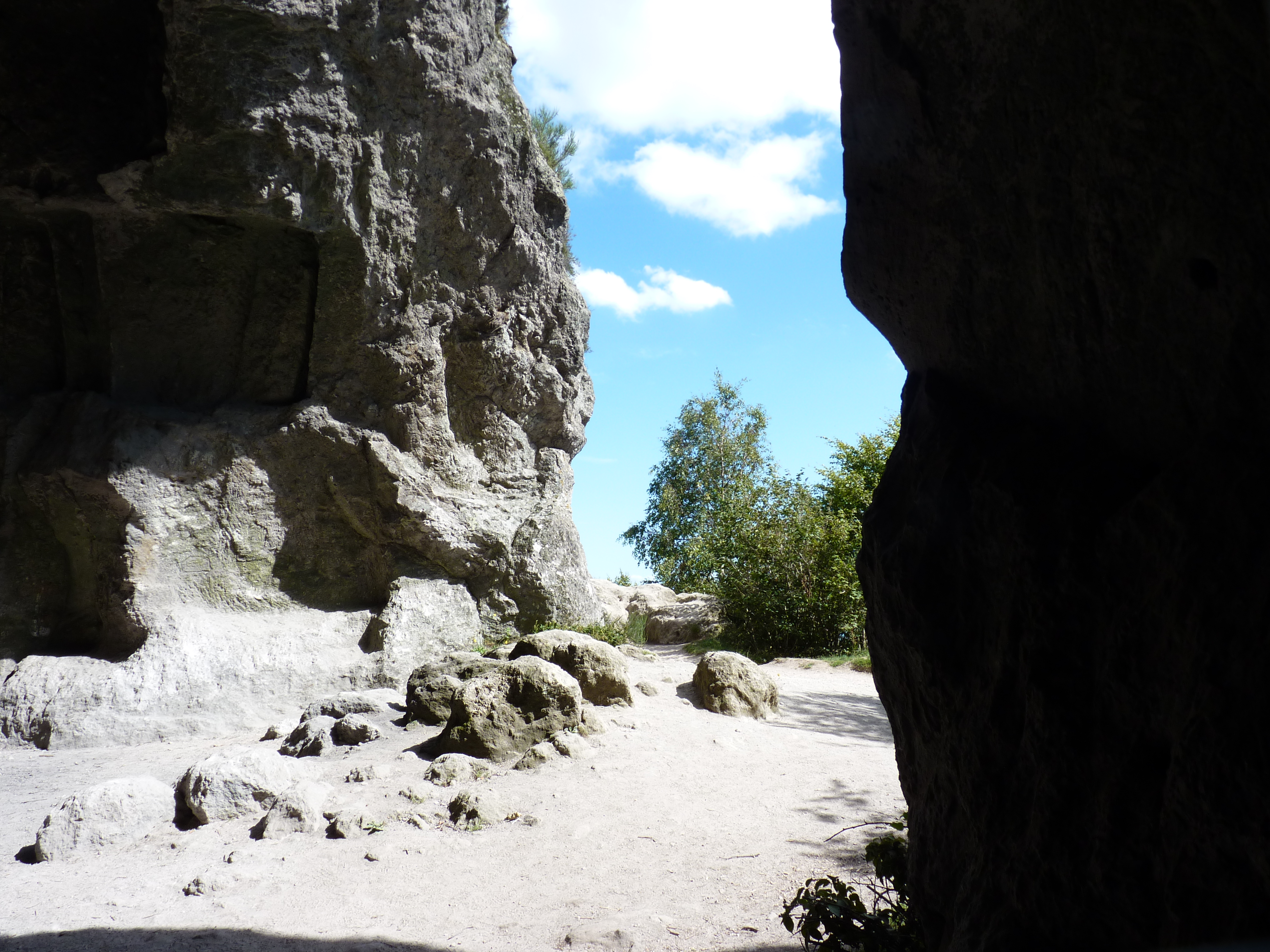 La Grotte du Sarcoui avant la montée au sommet du Grand Sarcoui (1 147m).